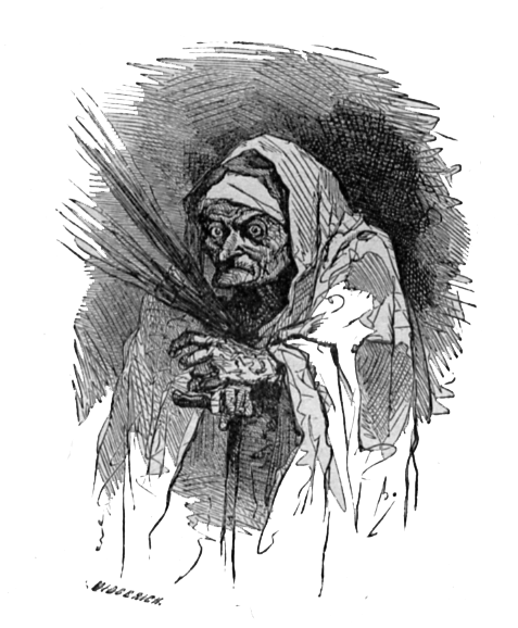 Pour la source voir : Discuter:Contes d'Andersen Vignettes de Bertall illustrant le conte Le Compagnon de voyage.